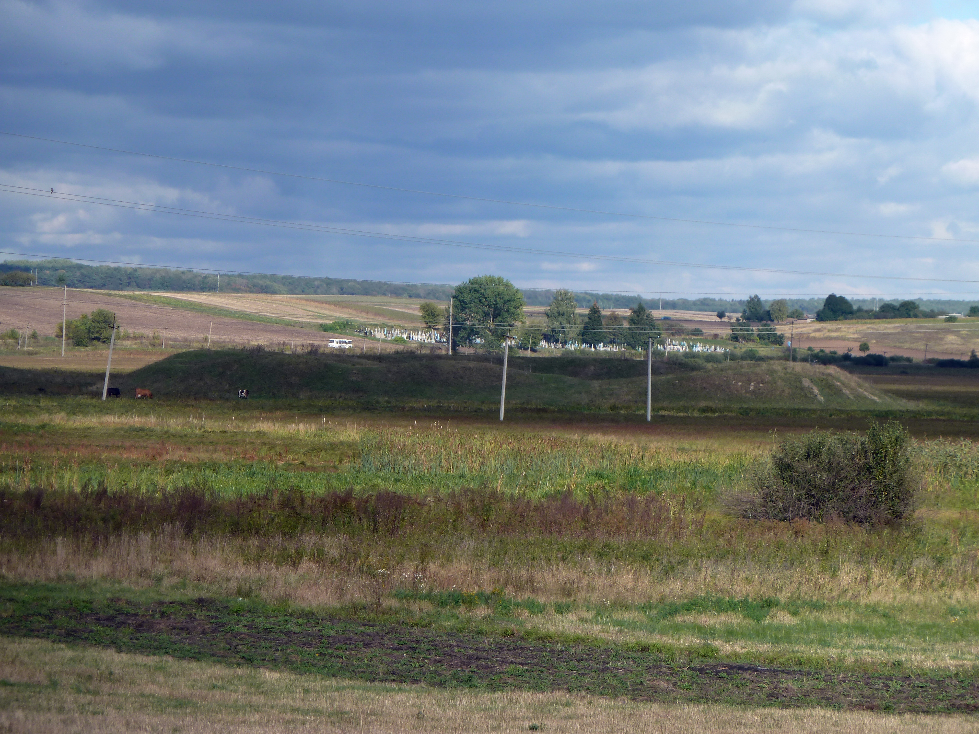 Городище (дитинець і окольне місто) (XI - XIII ст.) - смт Локачі (за 1,0 км на схід від ставка, на підвищенні п'ятикутної форми, поблизу правого берега р.Луга) Волинська область Україна